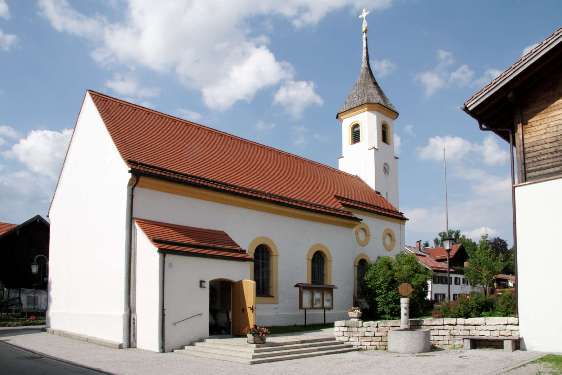 Saulgrub, Katholische Pfarrkirche St. Anton im Ortsteil Altenau